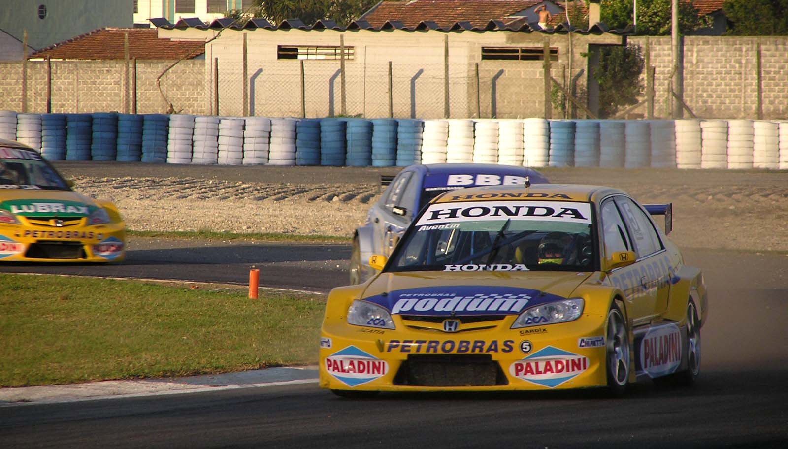 TC2000 team "Honda Petrobras Podium": Honda Civic #5 Diego Aventín.